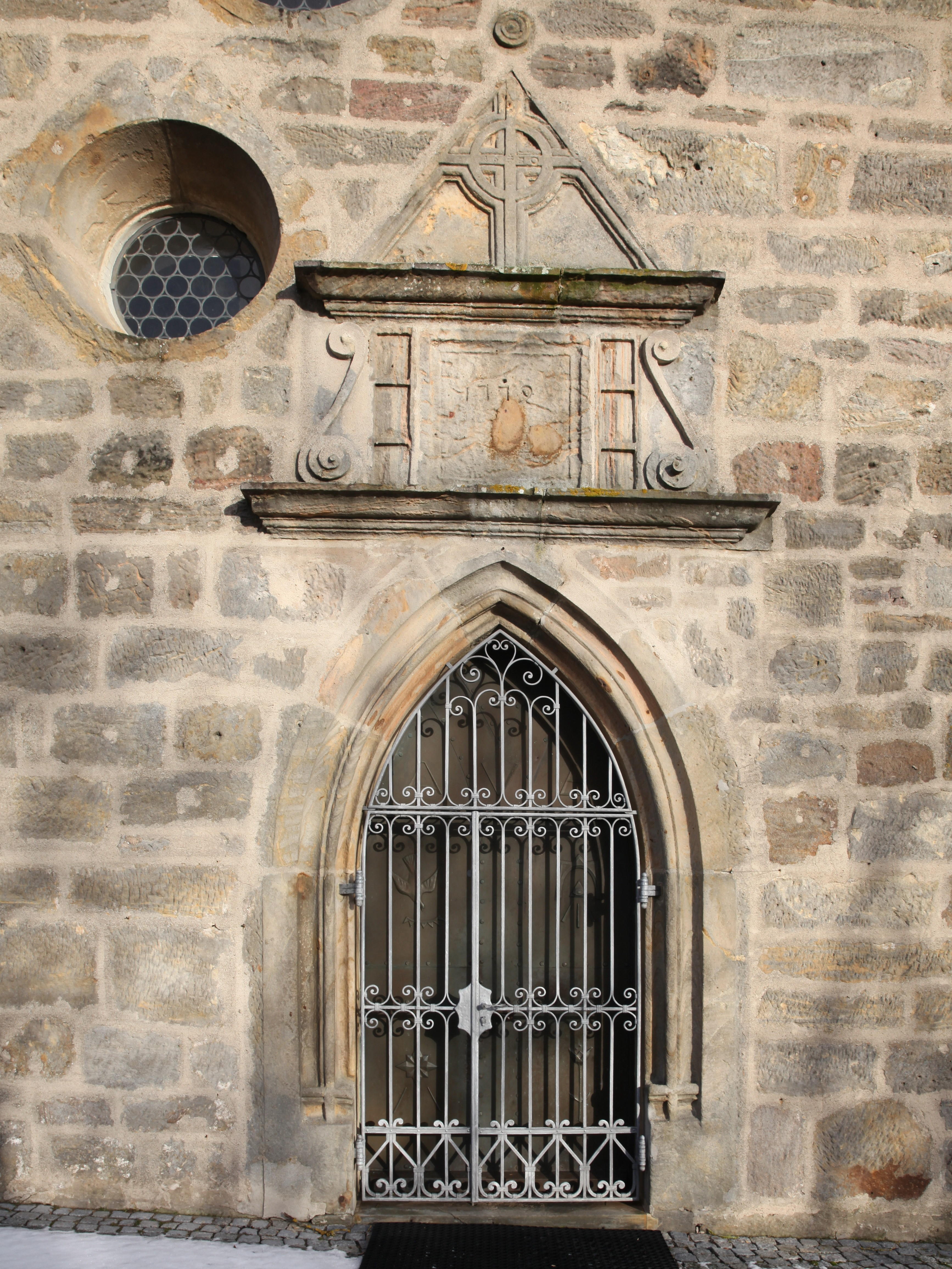 Pfarrkirche Mariä Geburt in Neundorf bei Weitramsdorf, Landkreis Coburg